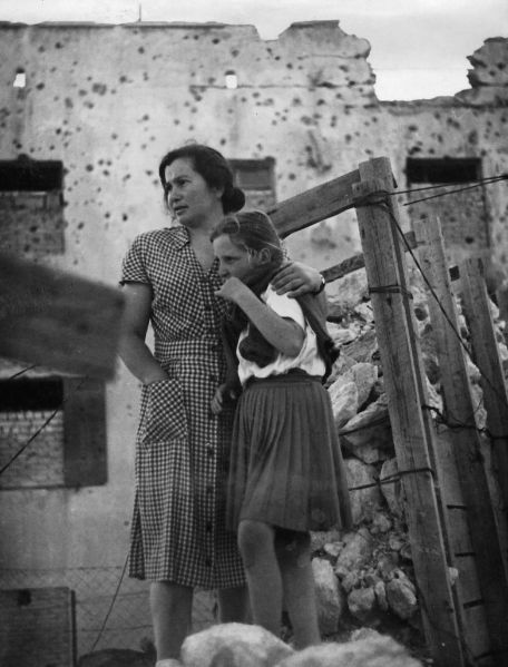 אם ובתה חוזרות לרמת רחל ההרוסה